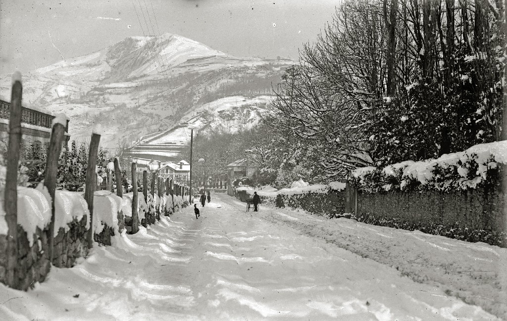 Título original: Vista del monte Uzturre (1/1) Localización: Tolosa (Guipúzcoa)